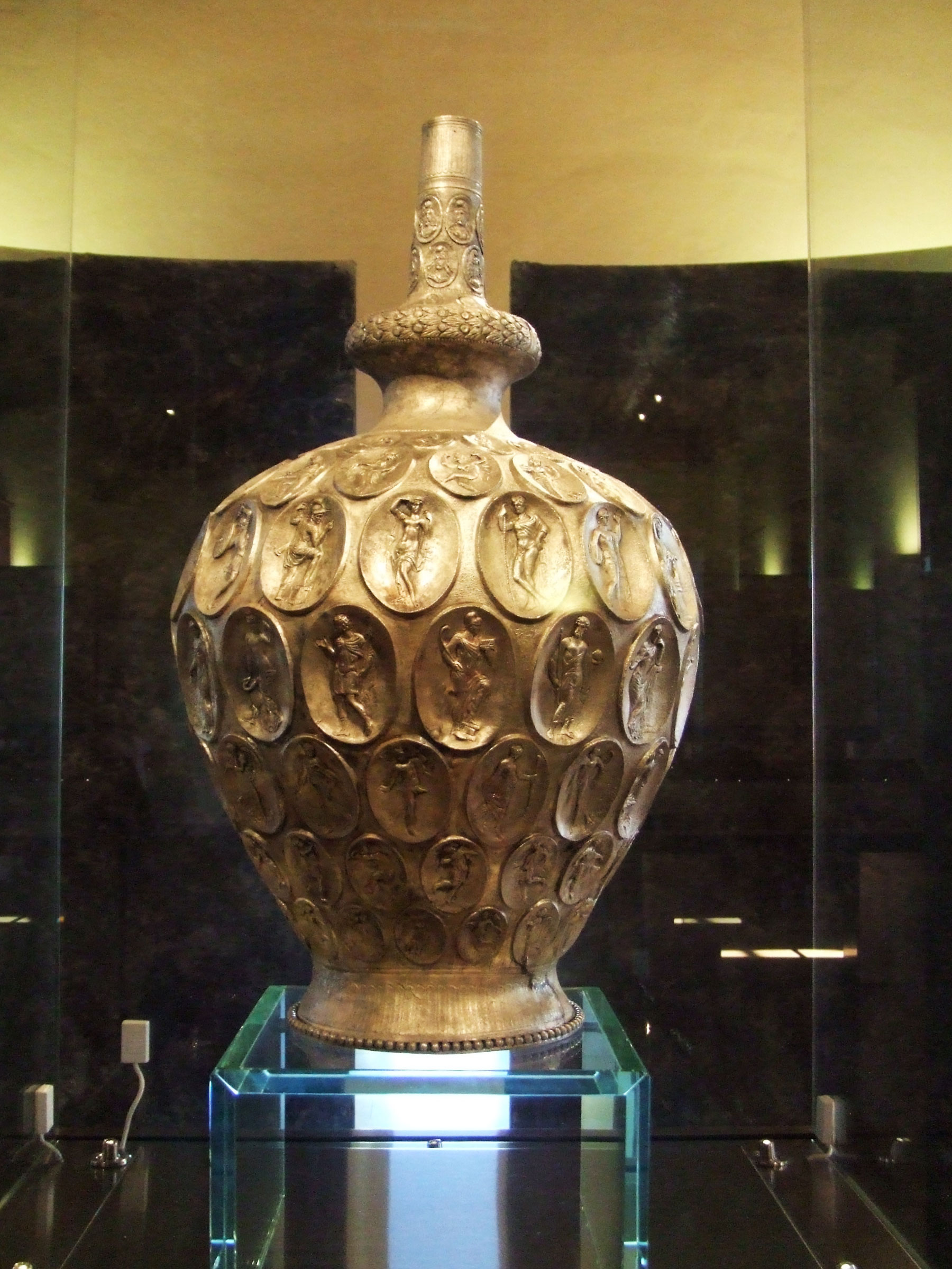 Amphore de Baratti restaurée et conservée au musé archéologique du territoire de Populonia à Piombino